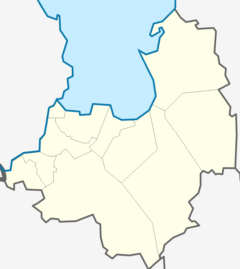 Карта Кировского района Ленинградской области.